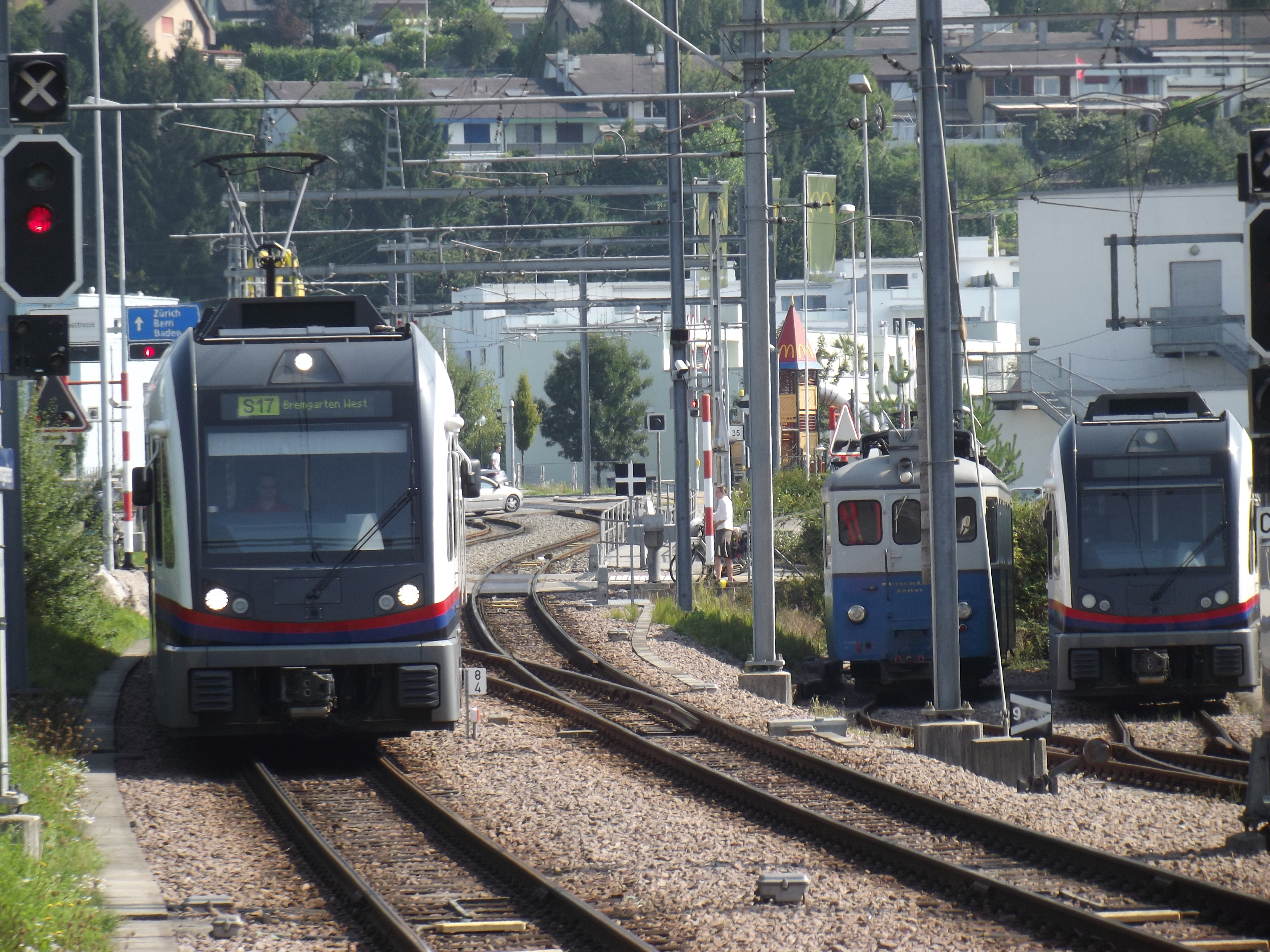 S17 S-Bahn: Metersporige regionaal spoorlijn tussen Dietikon en Wohlen. Hier de stelplaats bij Bremgarten station.